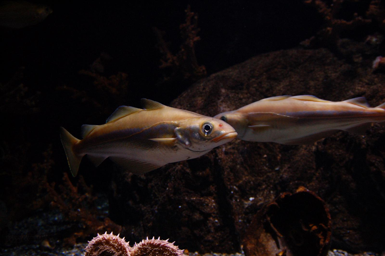 Abadejo (Pollachius pollachius)